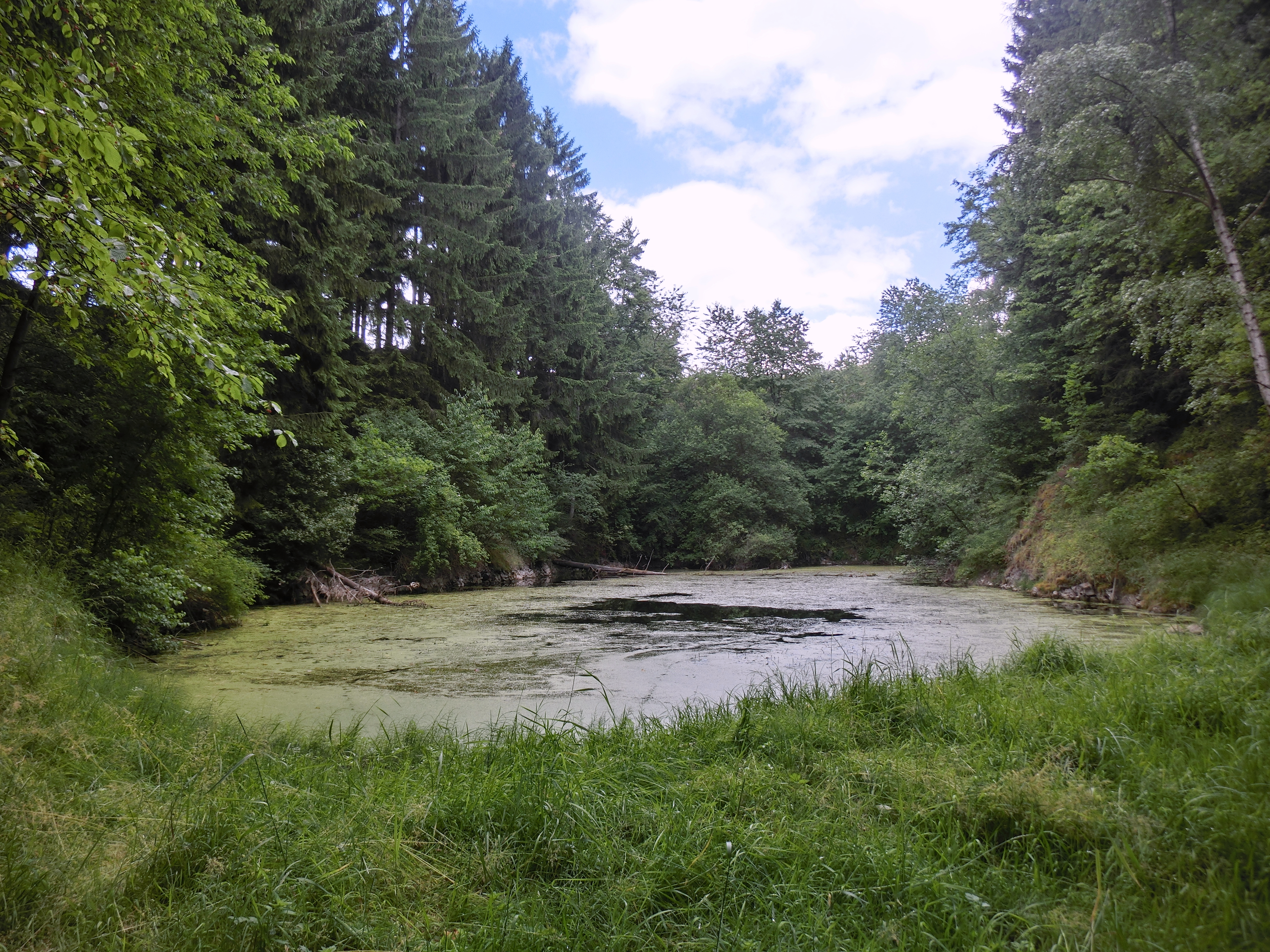 Alter Steinruch auf dem Kuschhügel